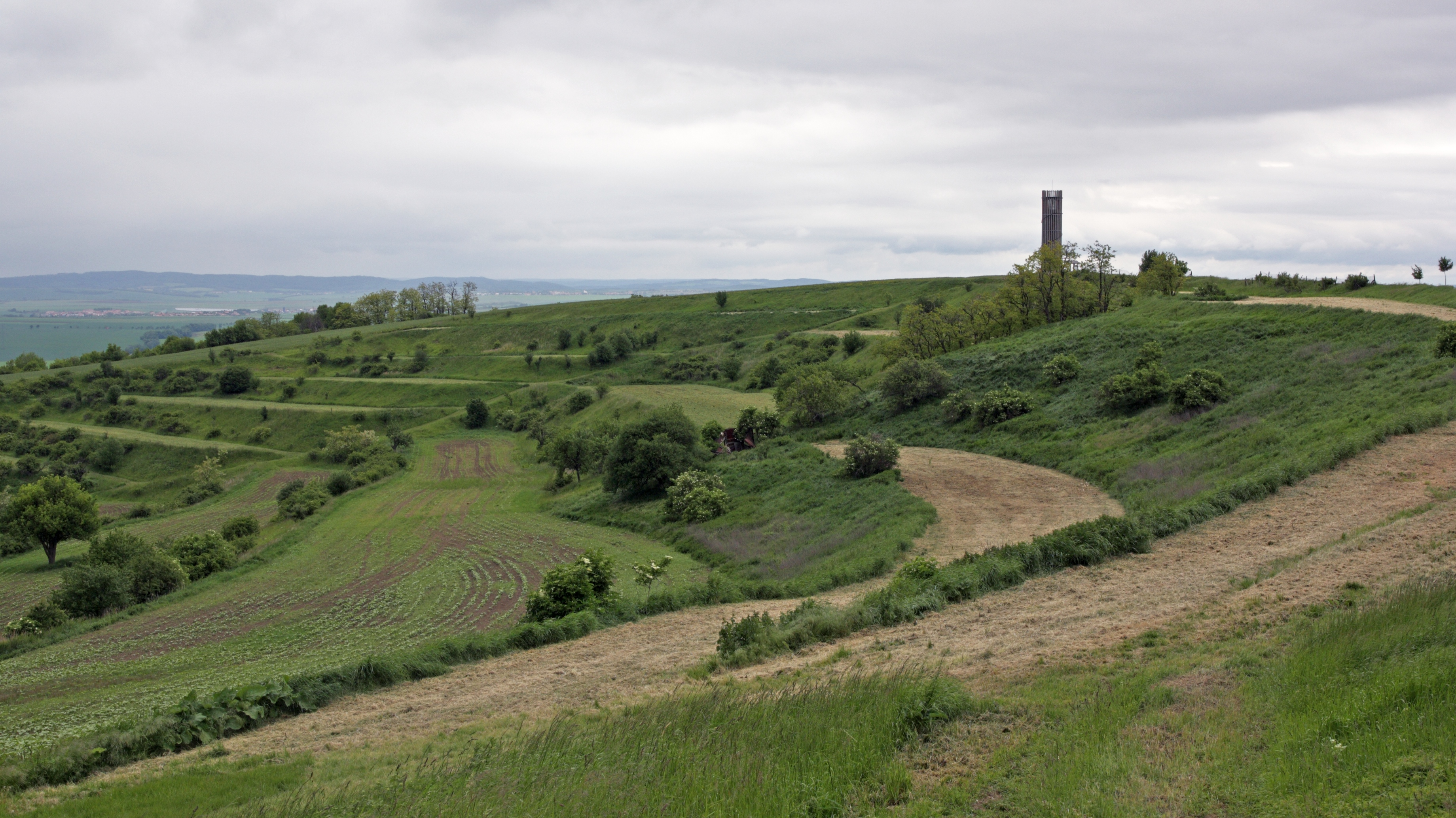 Pohled na západní vrcholovou část Výhonu s terasovými poli. Vpravo rozhledna Akátová věž.